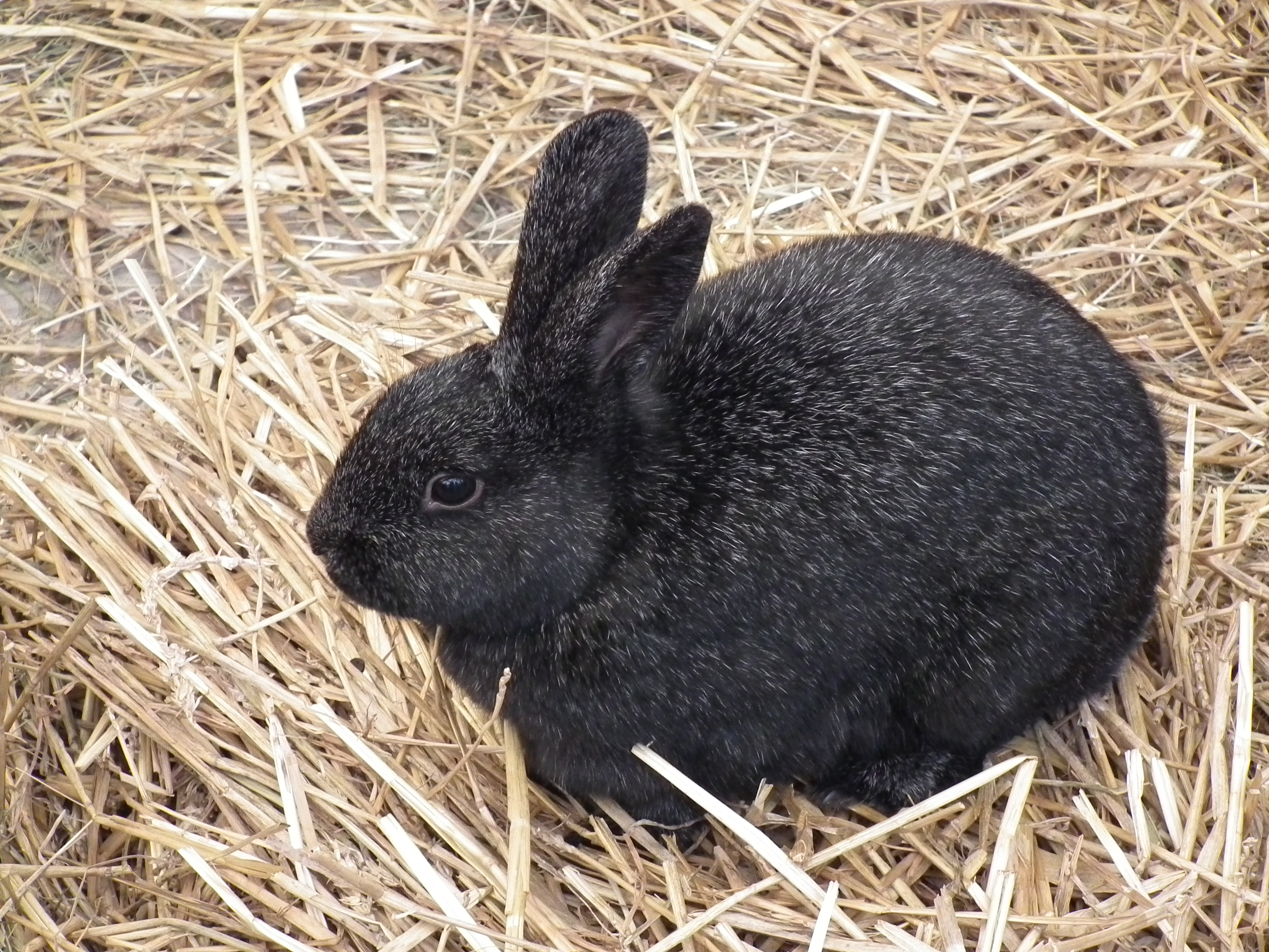 Schwarzes Kleinsilber-Kaninchen